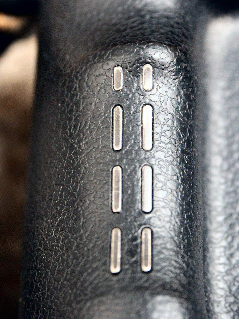 Minolta Dynax 9 - Griffsensor am Handgriff (Fotografiert mit: Minolta Dimage 7 Hi)